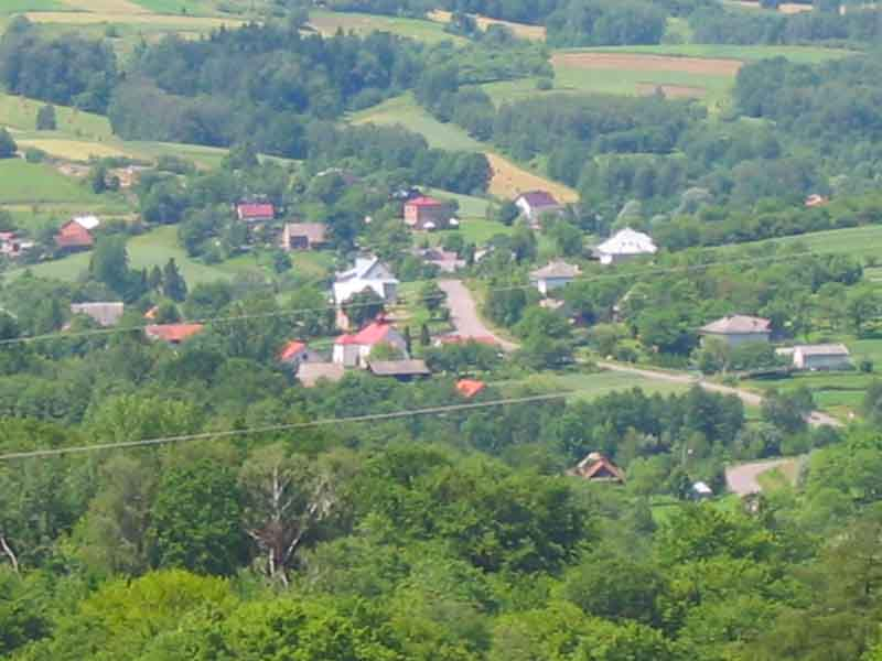 Sowina podkarpacka